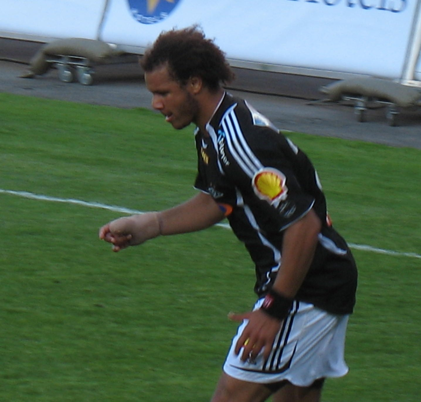 Fotballspilleren Daniel Braaten